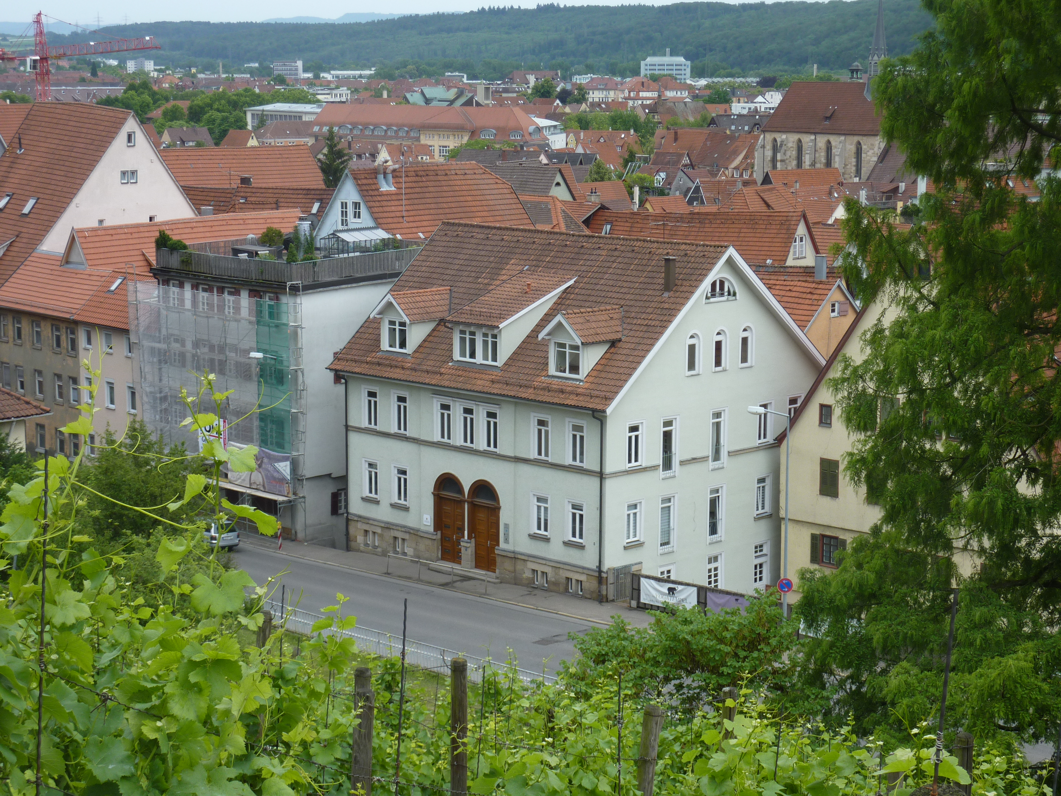 ehemaliges katholisches Pfarrhaus, Augustinerstr. 5 in Esslingen